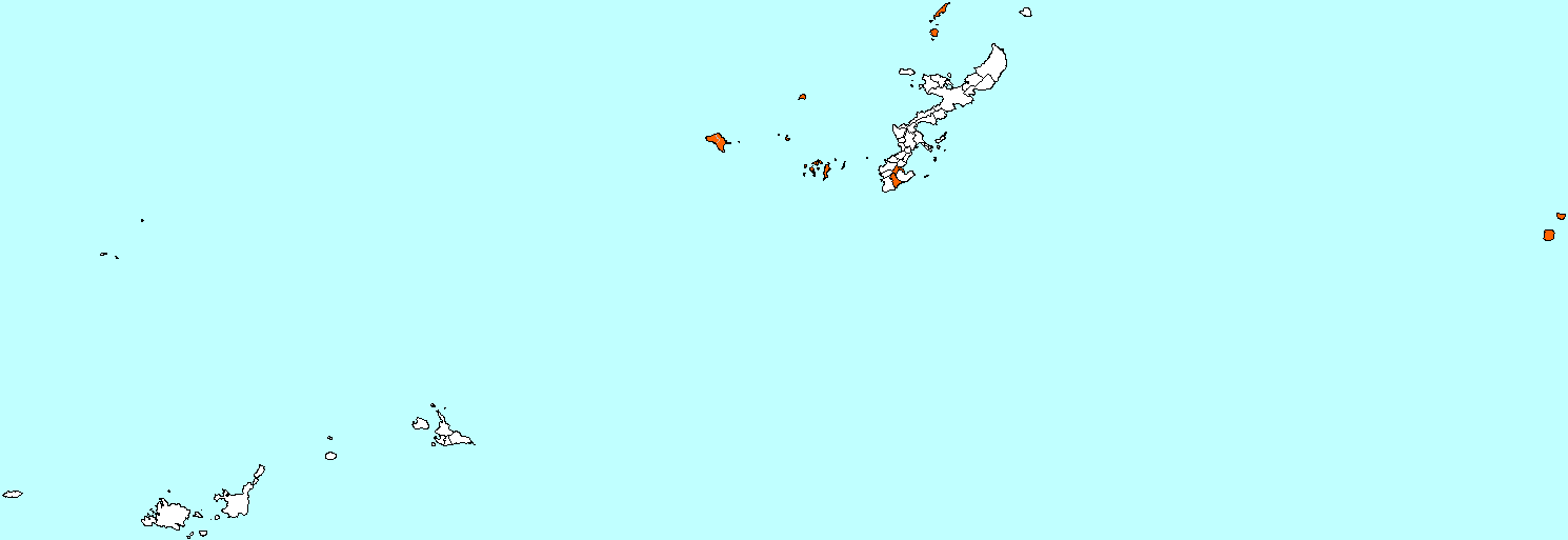 Okinawa Shimajiri-gun